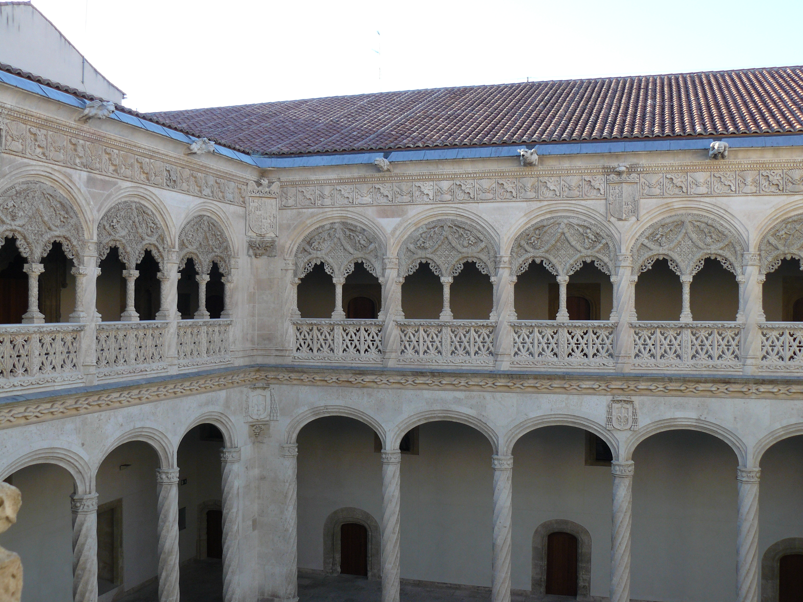 Colegio de San Gregorio , Valladolid.